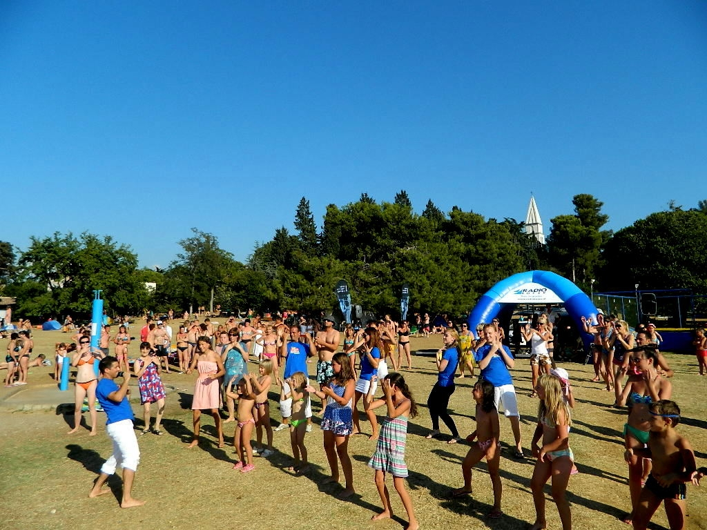 SMS na plaži